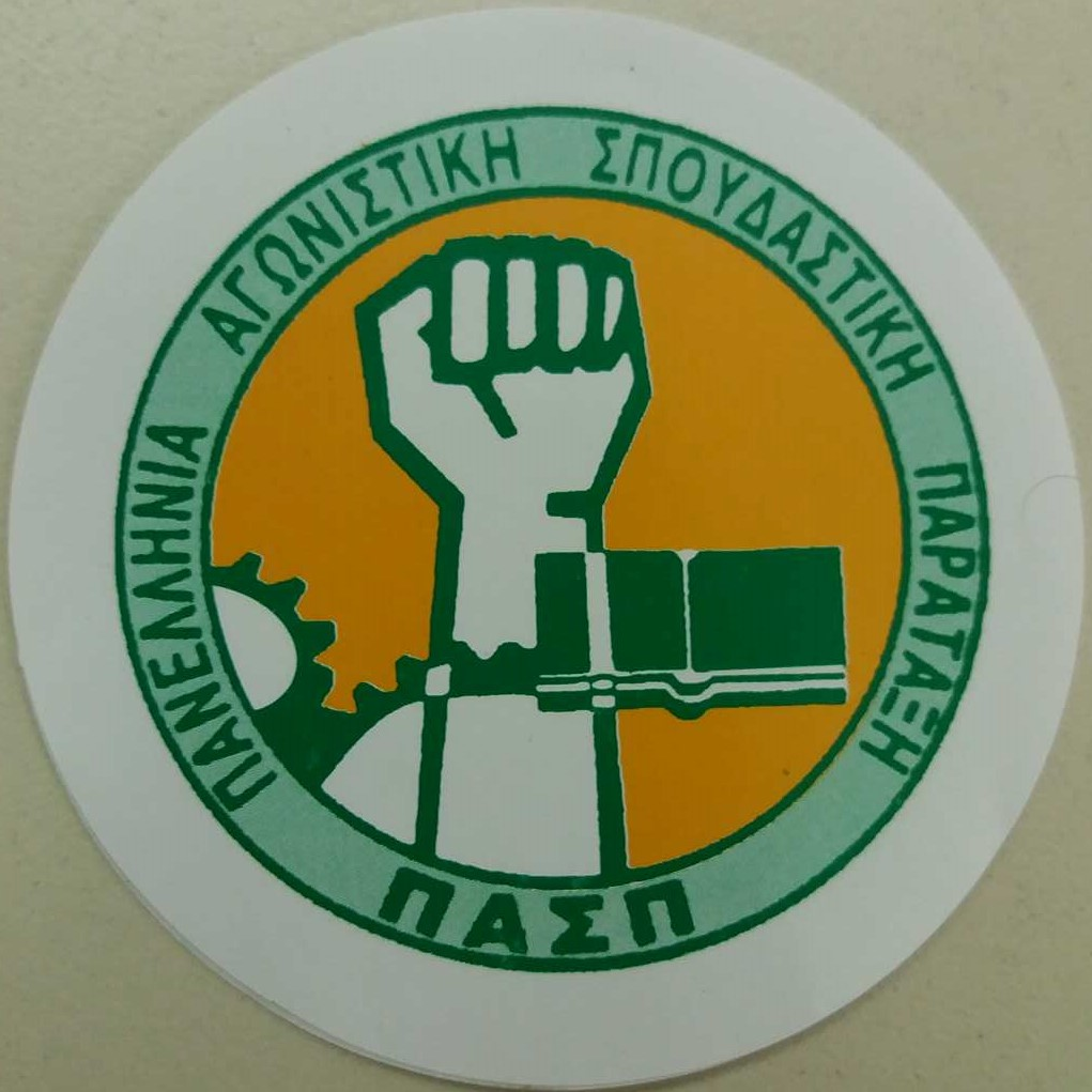 επισημο λογοτυπο ΠΑΣΠ